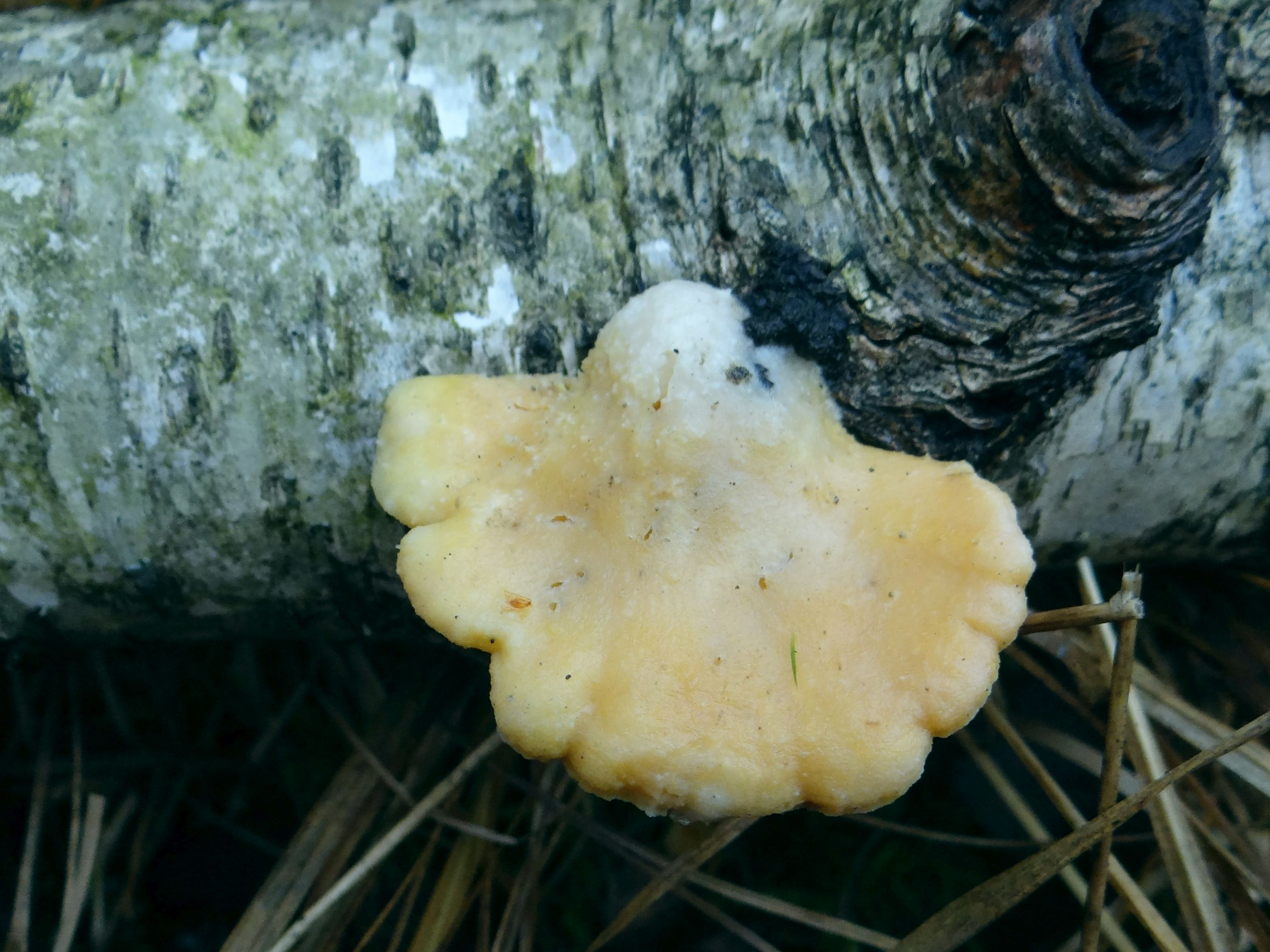 Postia tephroleuca (location: Poland, Biadoliny Szlacheckie)